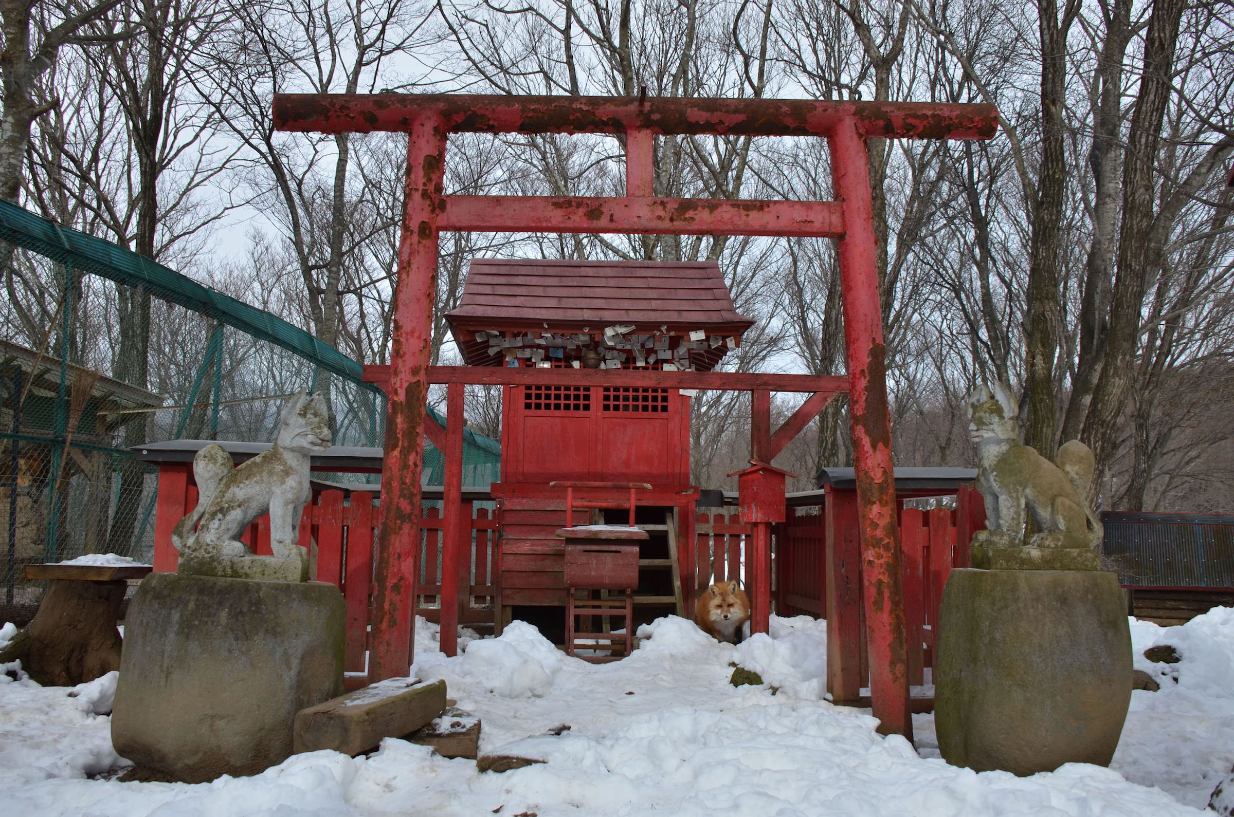 蔵王キツネ村内にある社